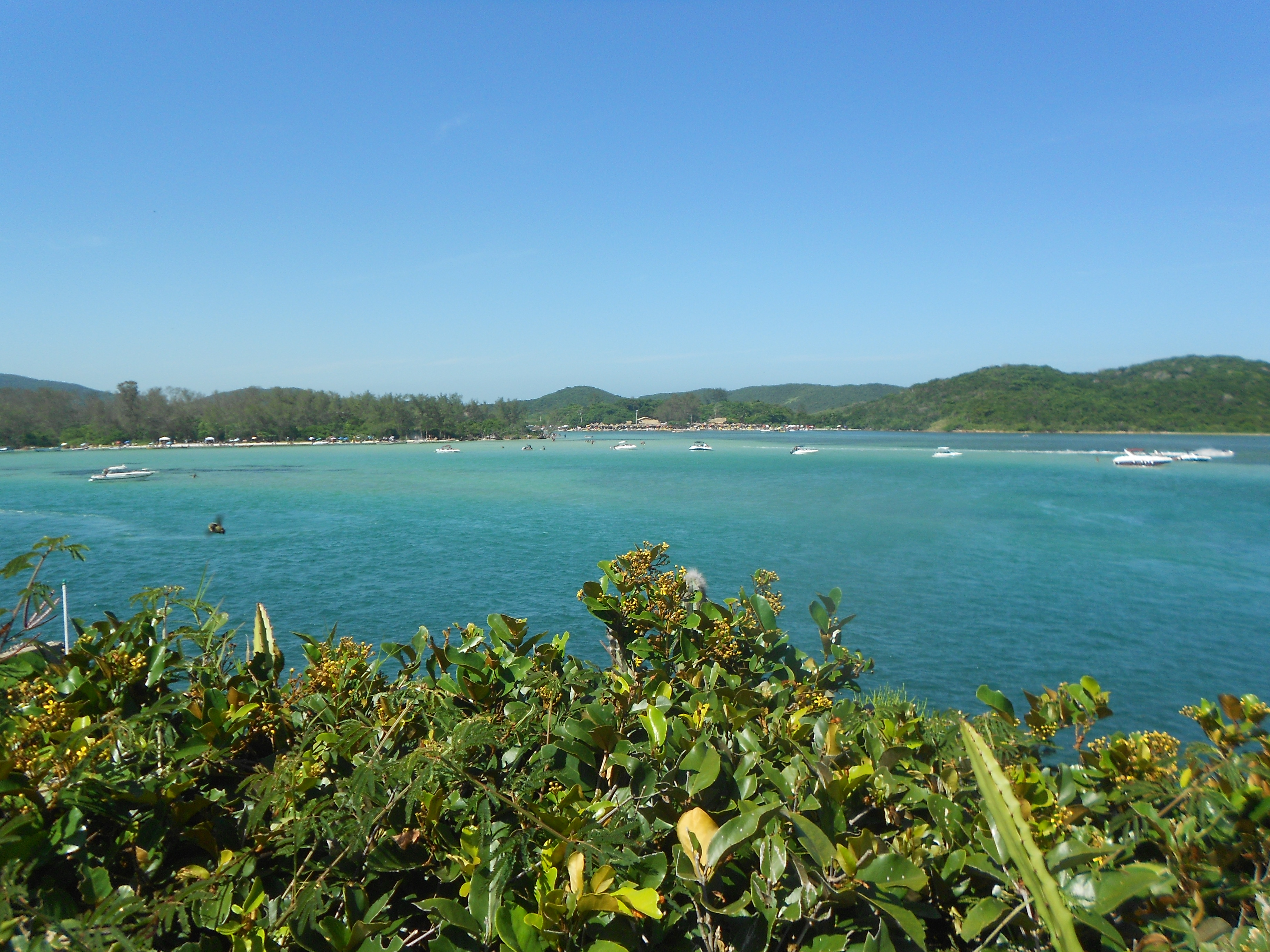 Lagoa de Araruama